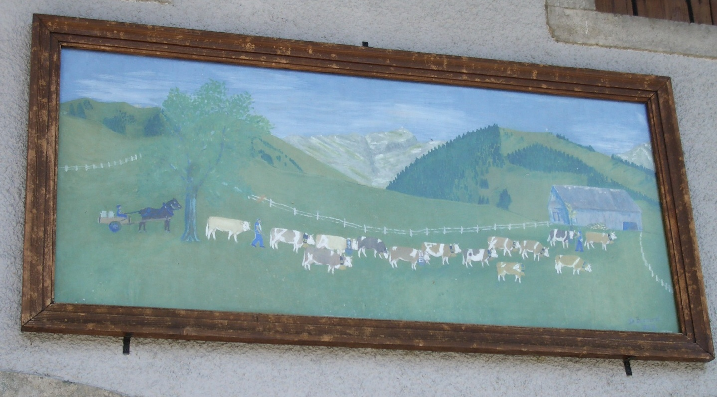 Grandvillard, Switzerland self-made, August 2005